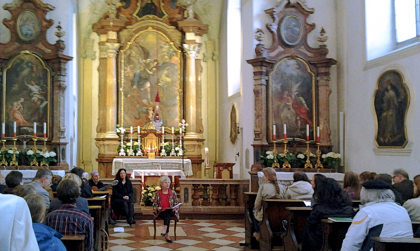 Gedenkveranstaltung der Salzburger Autorengruppe in der Michaelskirche am Salzburger Residenzplatz anlässlich der Bücherverbrennung der Nationalsozialisten auf diesem Platz am 30. April 1938. Im Bild die Salzburger Schriftstellerin und Lyrikerin Christine Haidegger.